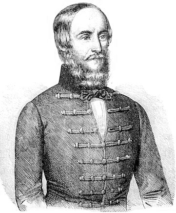 Kemény Dénes (1803–1849) politikus (Vasárnapi Ujság, 1856. szeptember 14.)